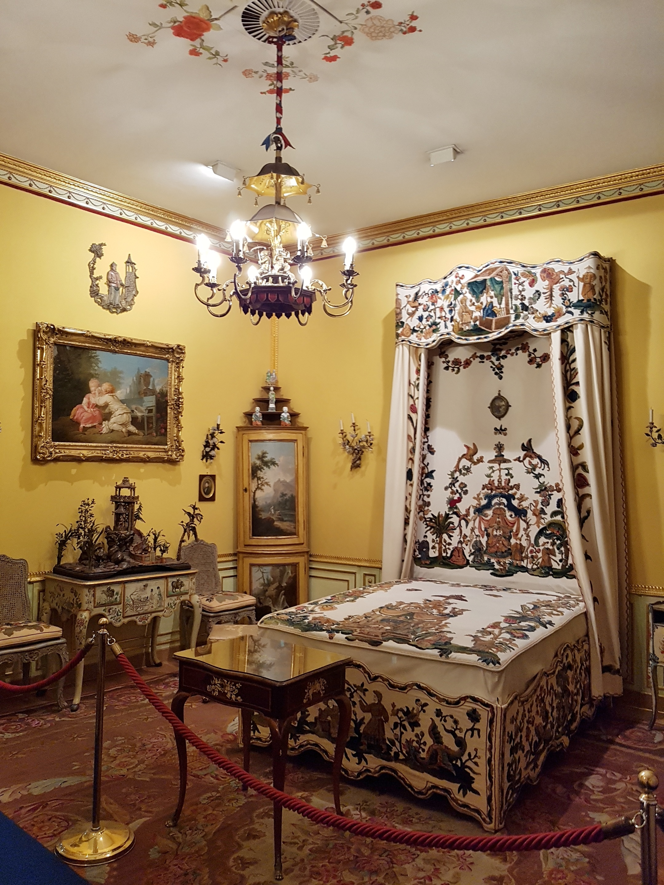 Sala Bandera, Museo di Arti Decorative Accorsi–Ometto, Torino